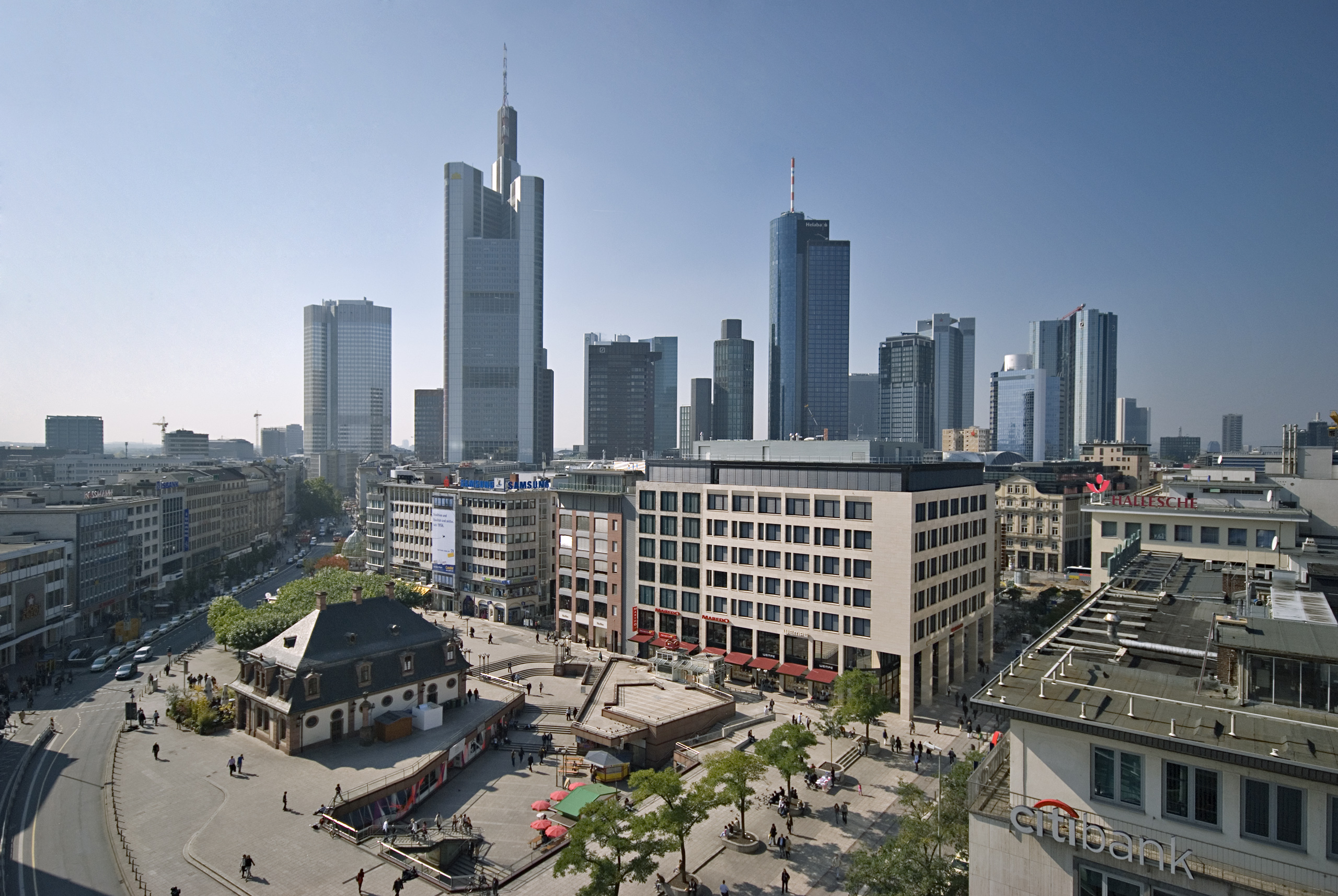 Hauptwache Frankfurt am Main